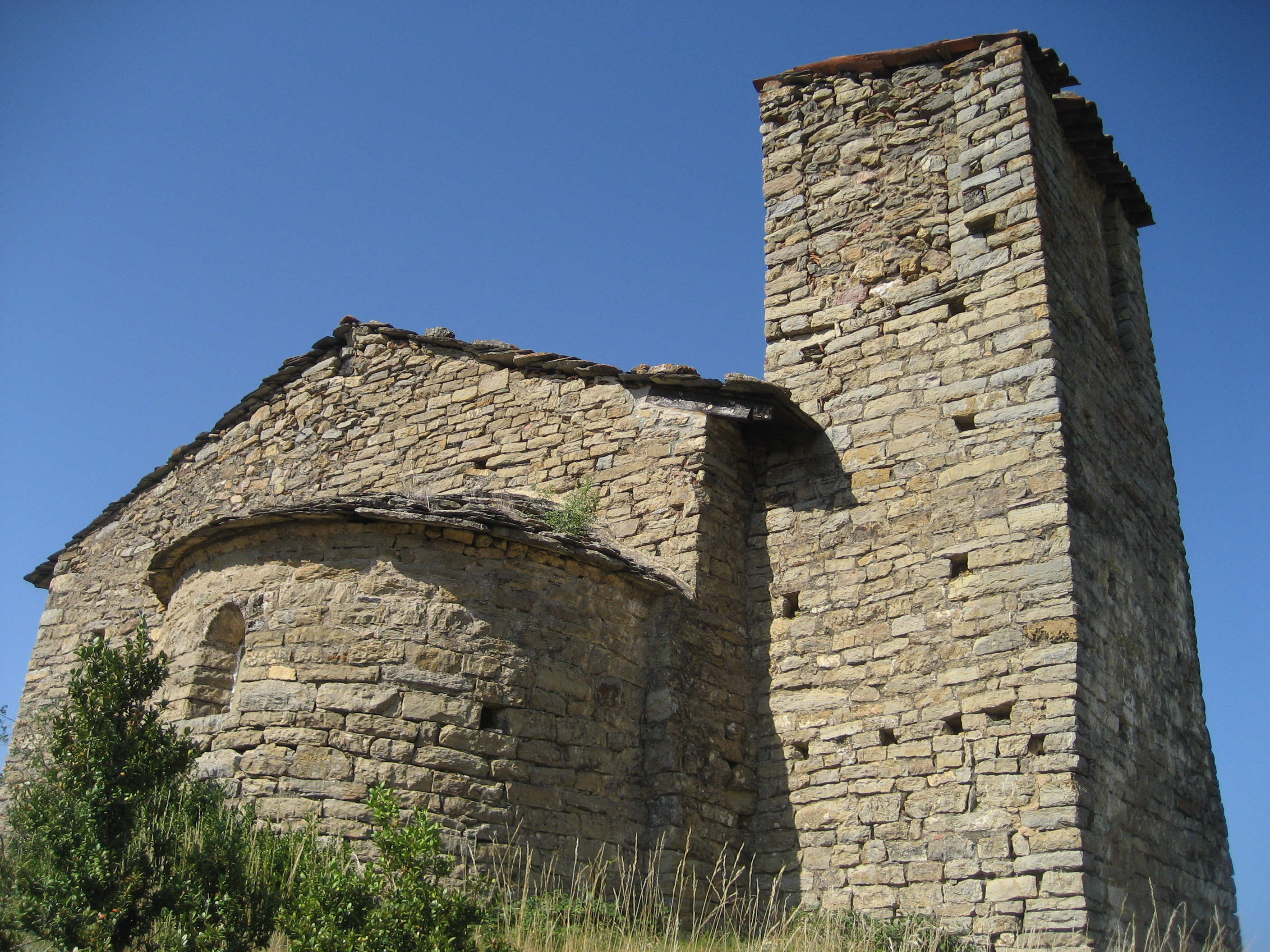 Iglesia de Santa Maria de les Peces en la comarca catalana del Alto Urgel (Spain)